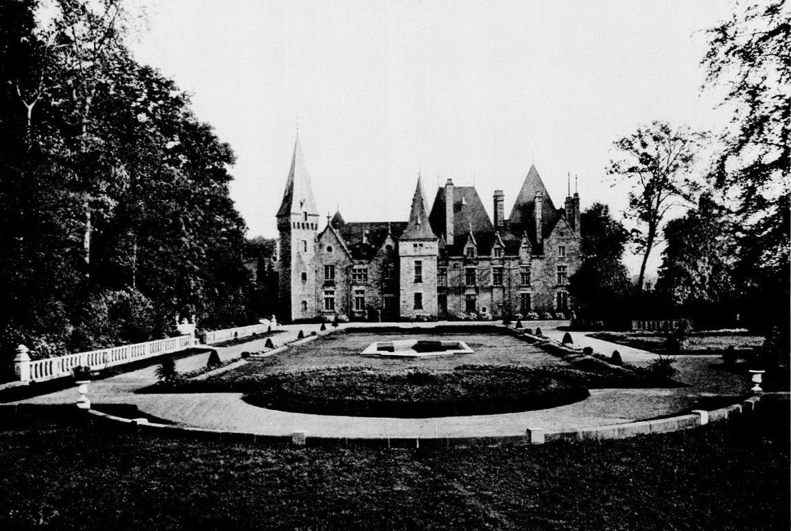 La façade nord du château du Bois-Cornillé et son parterre en 1908